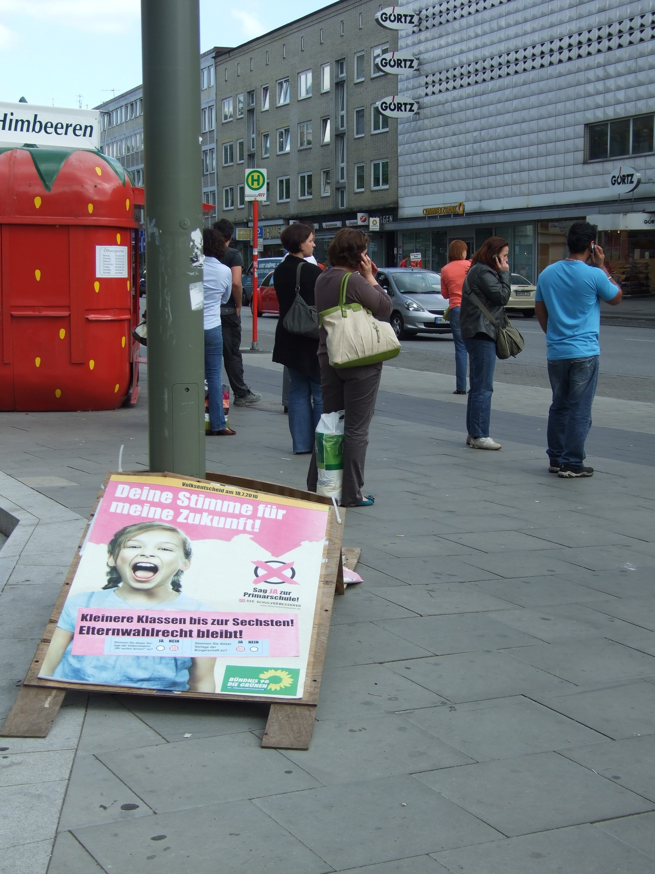 Schulreformplakat in HH-Eimsbüttel nach der Abstimmung